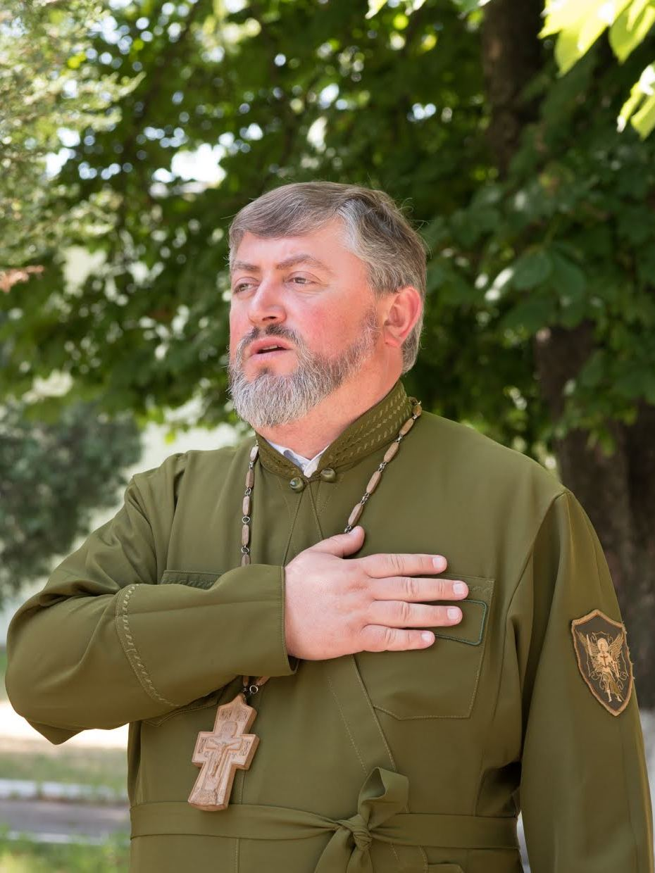 На фото зображений Перший заступник голови Синодального управління військового духовенства Православної Церкви України протоієрей Мельник Тарас Леонідович